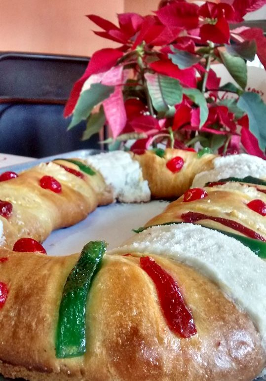 Rosca tradicional mexicana decorada con piña, cerezas y ate.